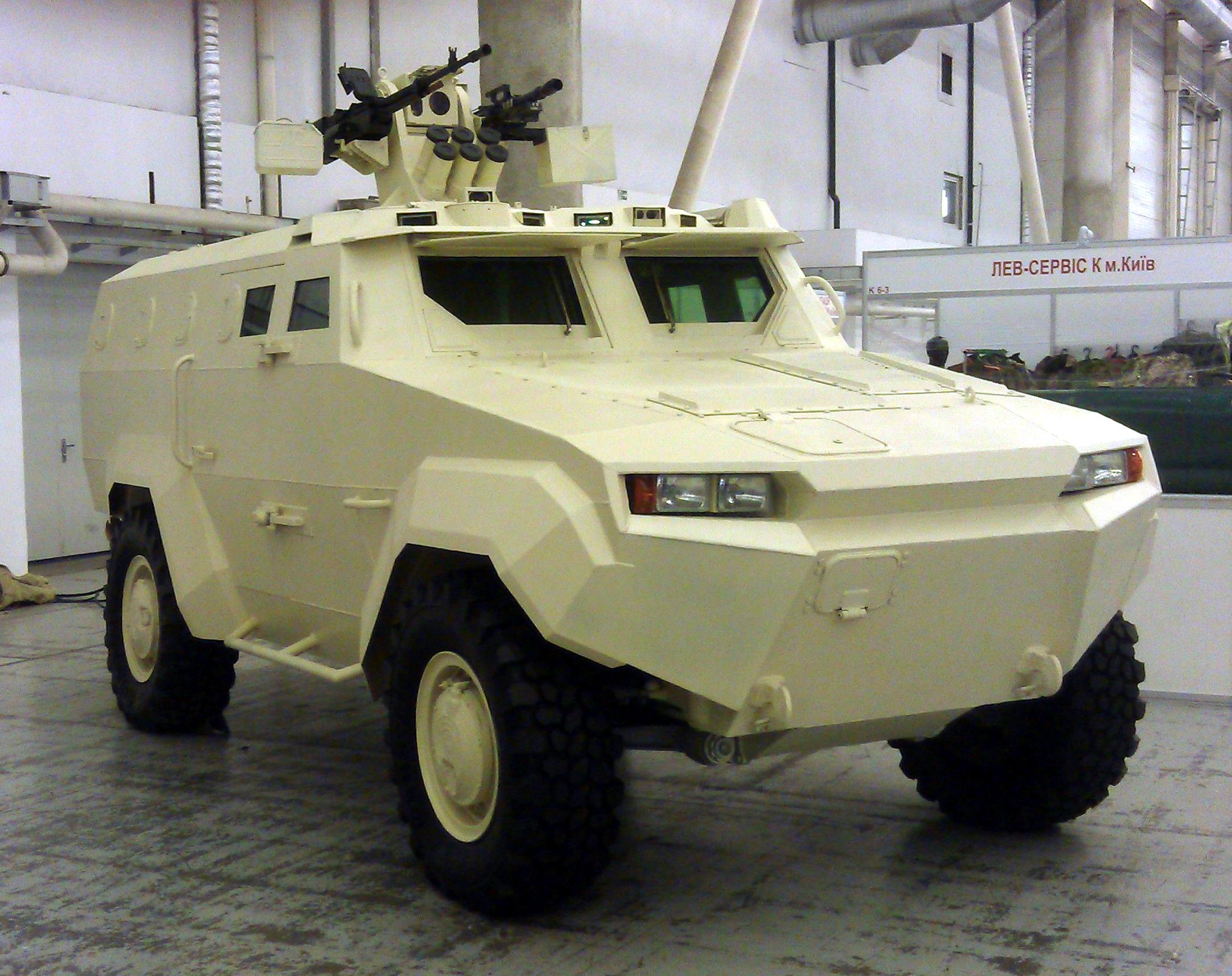 Бронетранспортер "Тритон" на стенде завода "Ленинская кузница". Выставка "Зброя та безпека", Киев, сентябрь 2015 г.